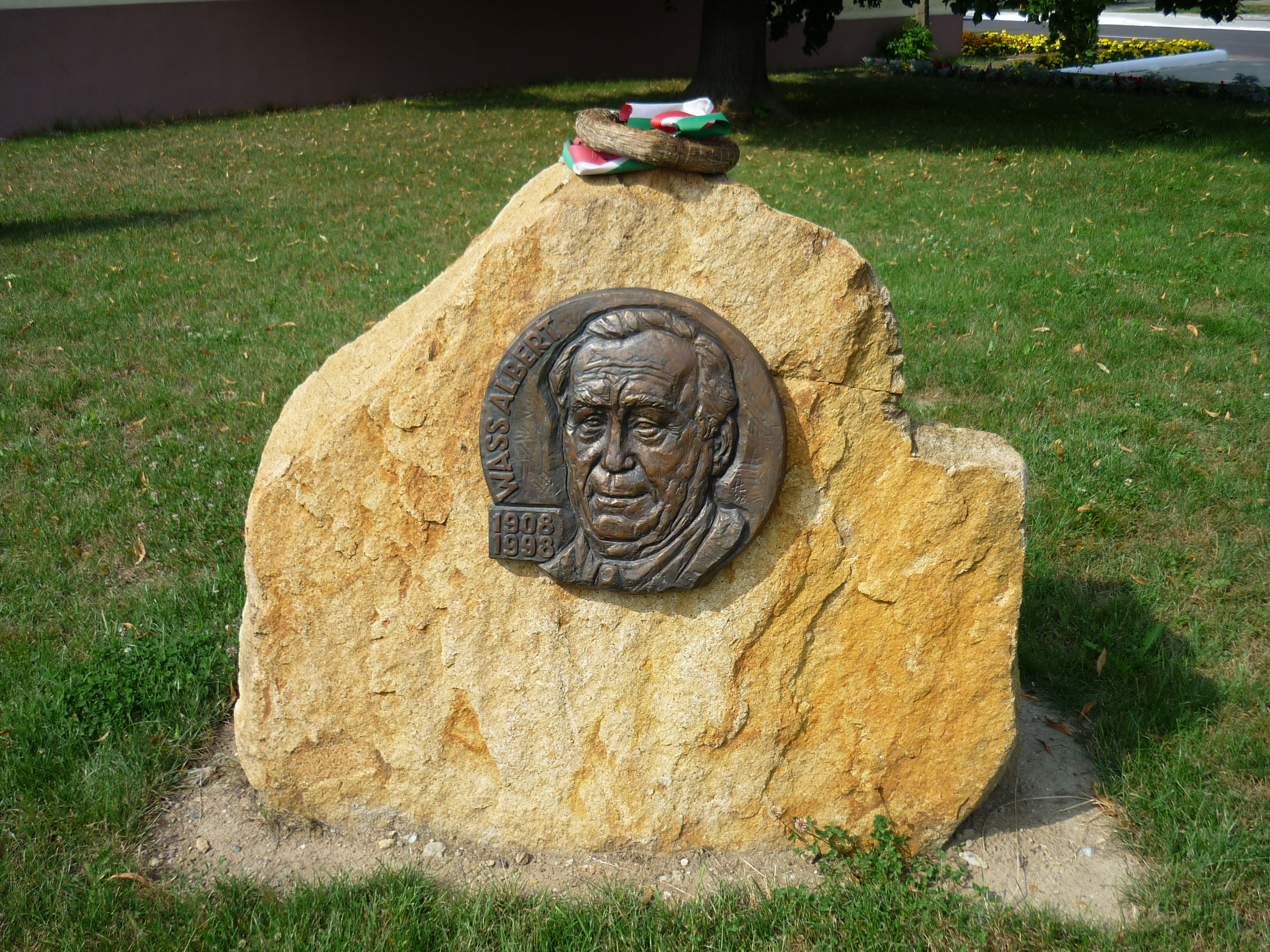 Wass Albert bronz domborműves emléktáblája (mászkő emlékkő Hunyadi László, 1998) Szendrő főterén